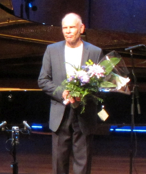 Jorma Hynninen, suomalainen oopperalaulaja Savonlinnan oopperajuhlilla vuonna 2016.